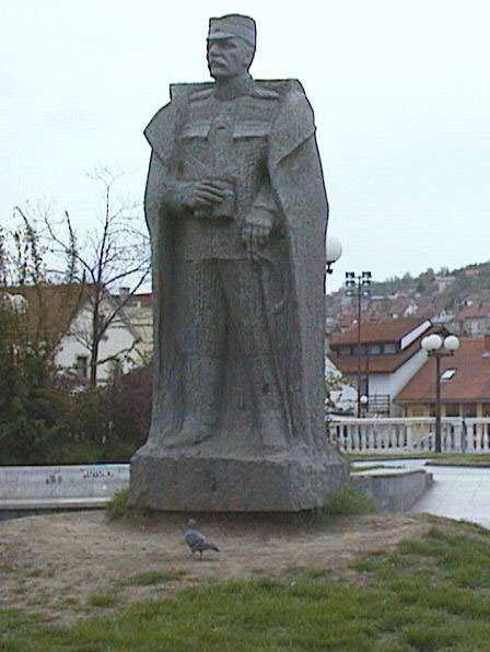 Statue of Živojin Mišić, at Valjevo, Serbia/Statue de Živojin Mišić, à Valjevo, Serbie